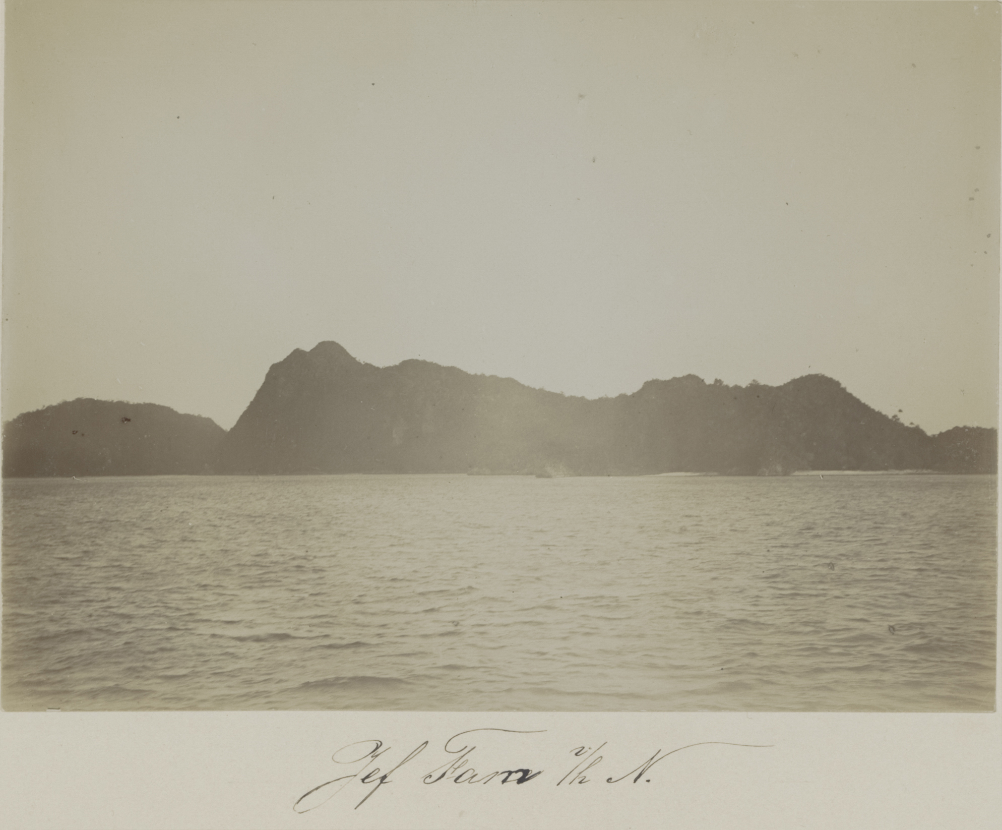 Academische Collecties: 1899-1900, Siboga-expeditie naar Nederlands Oost-Indië, onder leiding van Max Wilhelm Carl Weber Gezicht op het eiland vanuit het noorden.